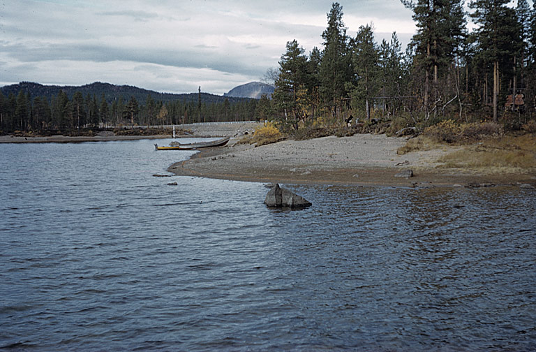 Jokkmokk 119:1. Stenåldersboplats vid Tjåmotisjaures västra strand Motiv: Jokkmokk 119:1 Kategori: Boplats, Insjömiljöer Jokkmokk 119:1. Stenåldersboplats vid Tjåmotisjaures västra strand. Jokkmokk 119:1.